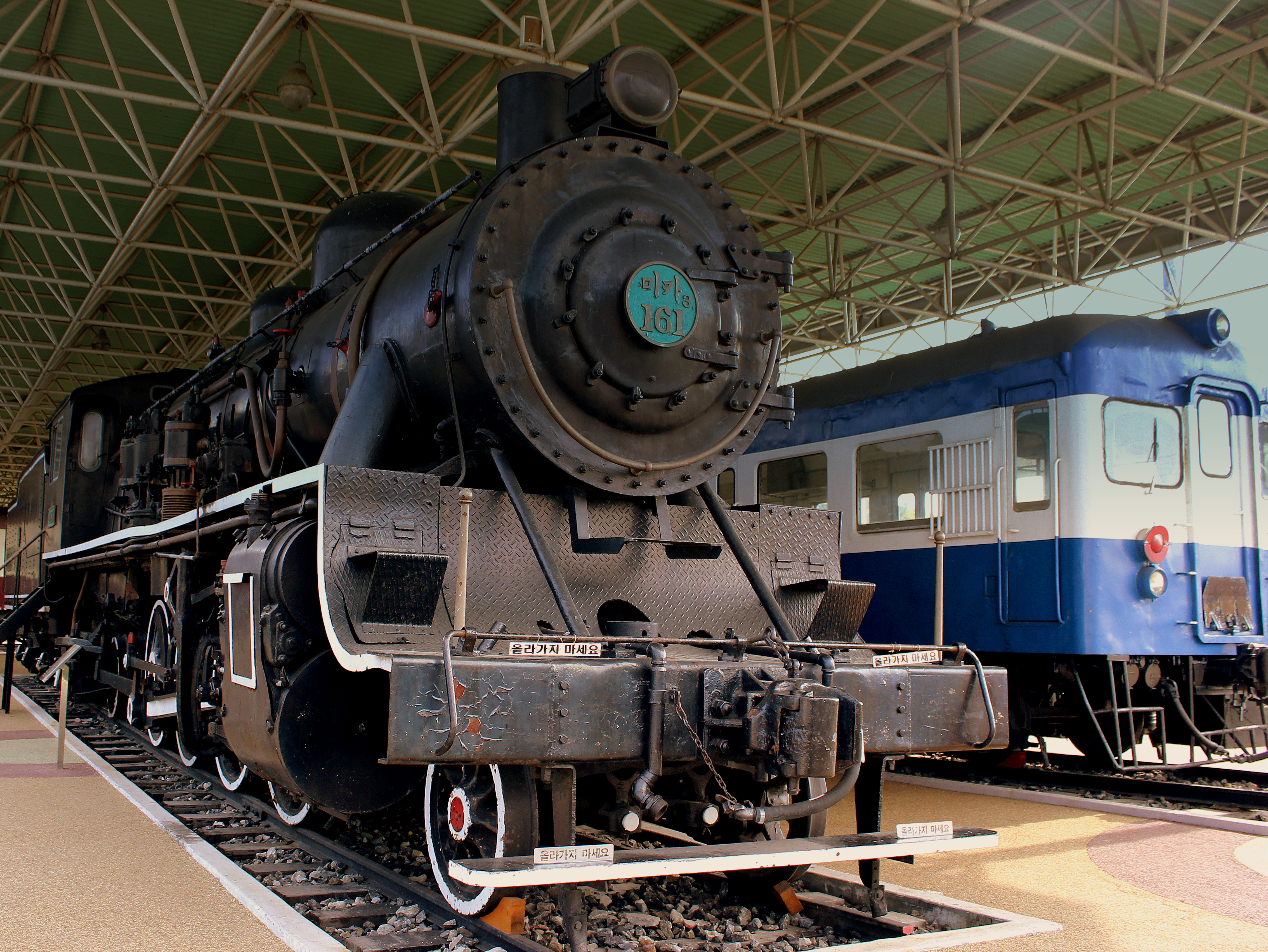 SEOUL RAILWAY MUSEUM SOUTH KOREA OCT 2012